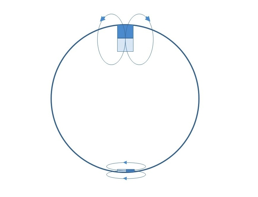 Vznášející se glóbus_řez